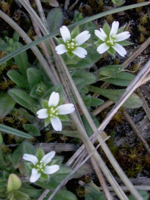 Cerastium diffusum Pointe d'Agon - Mance - France Source [1]